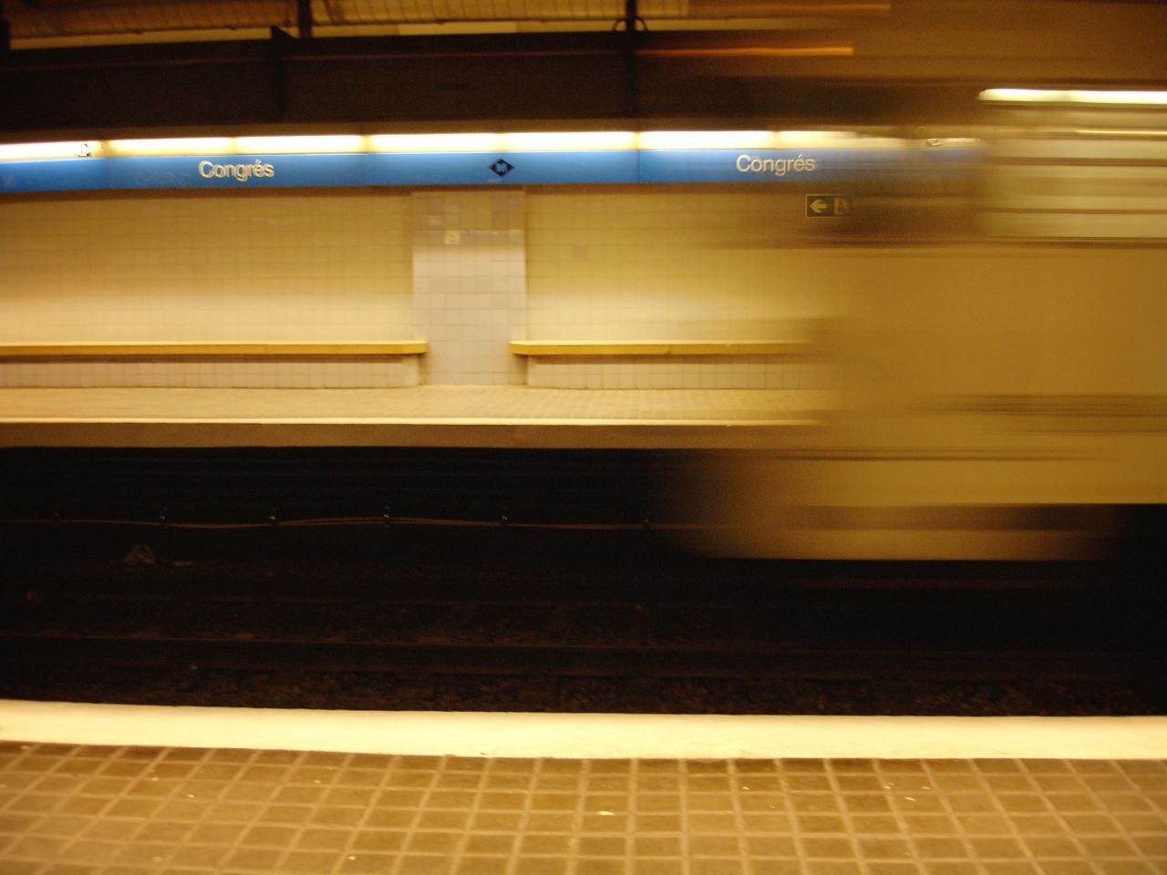 Llega el tren. Estación Congrés - Metro Barcelona / The train arrives. Congrés subway station - Barcelona.